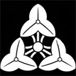 「三つ澤瀉」紋（染抜）